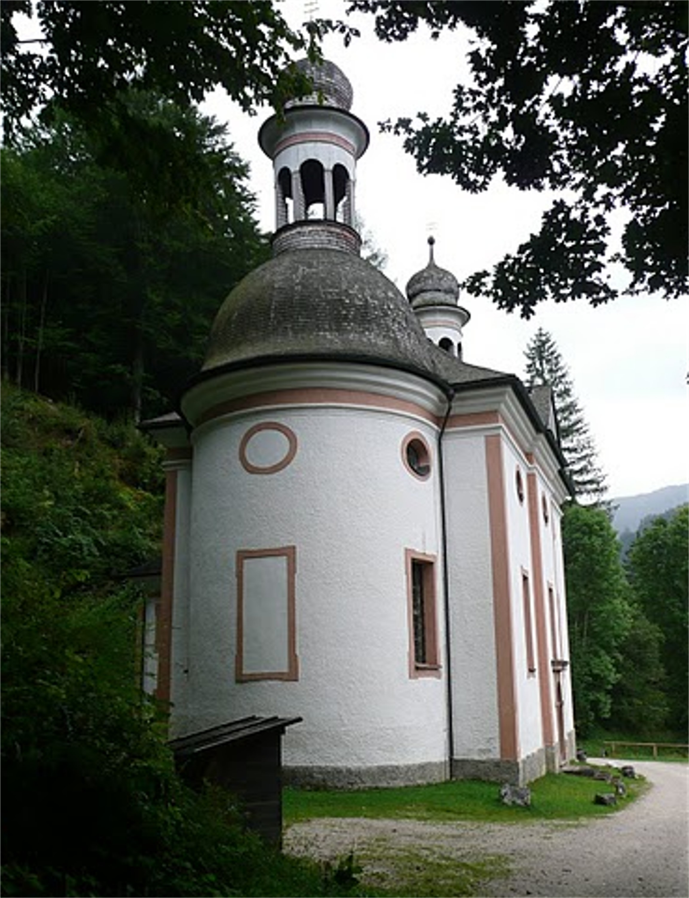 Die Wallfahrtskirche Maria Kunterweg oberhalb Ramsau bei Berchtesgaden. Hofbaumeister Sebastian Stumpfegger.